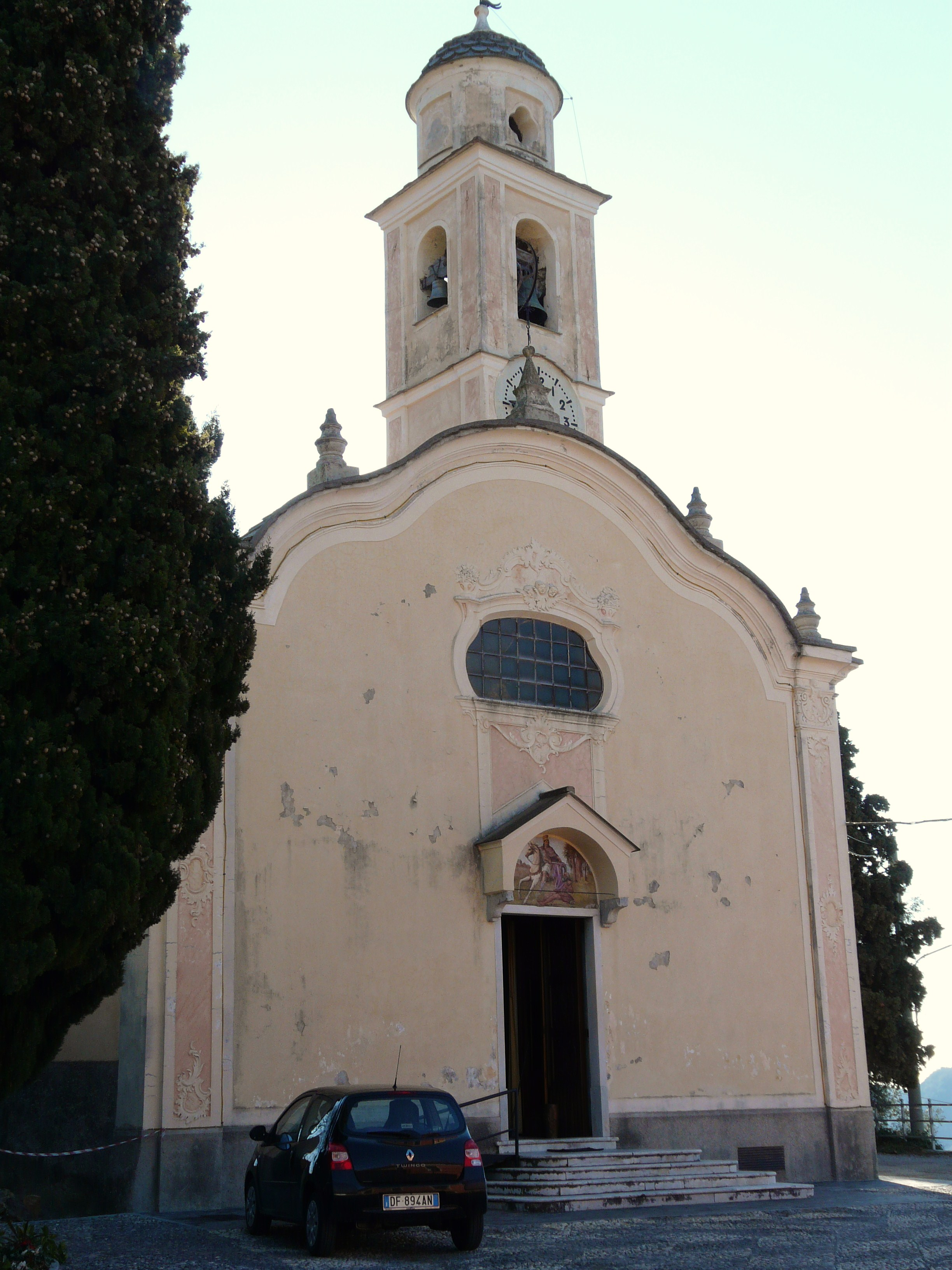 Chiesa di San Martino, Onzo, Liguria, Italia